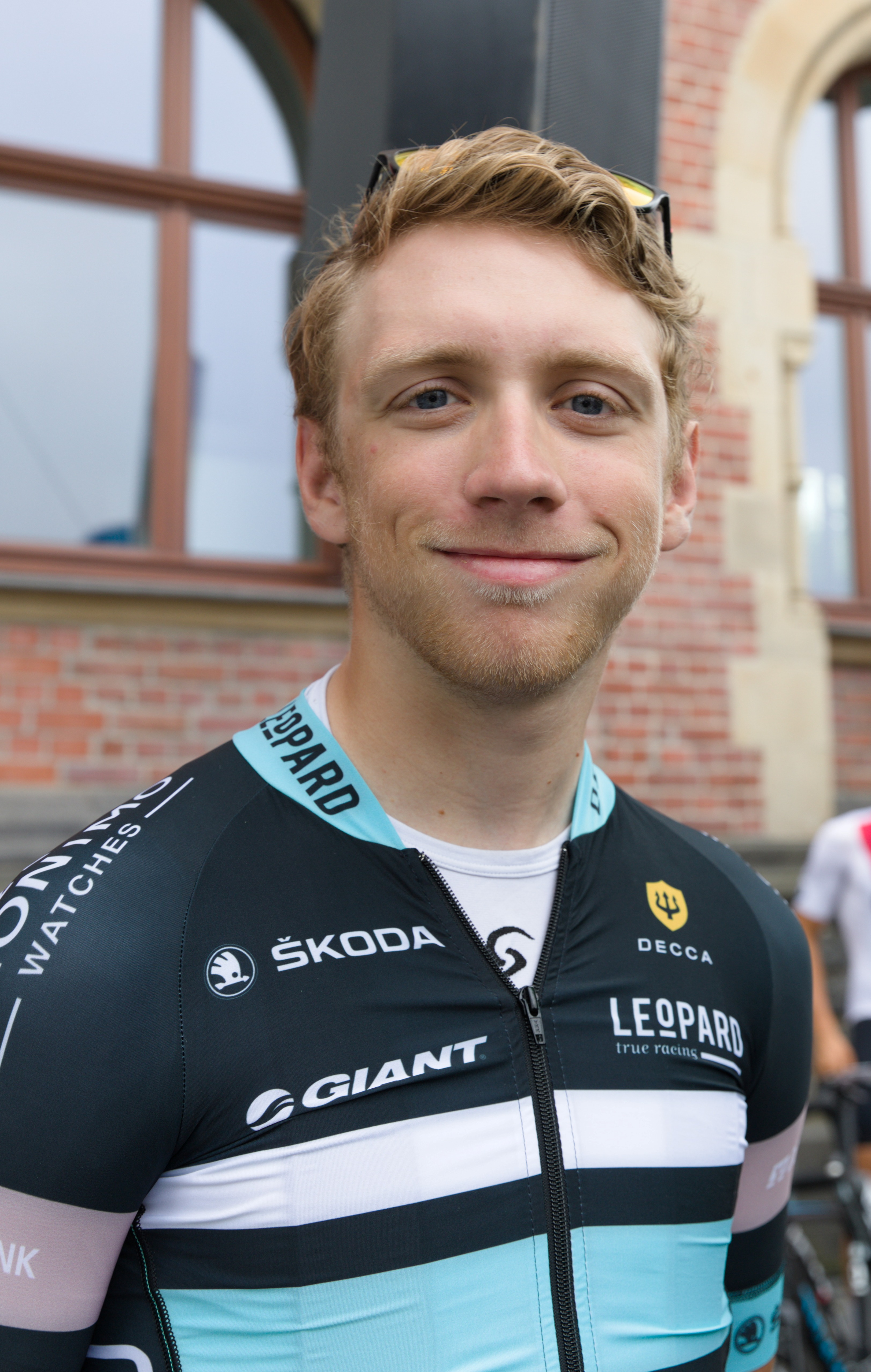 Charlie Quarterman, britischer Radsportler